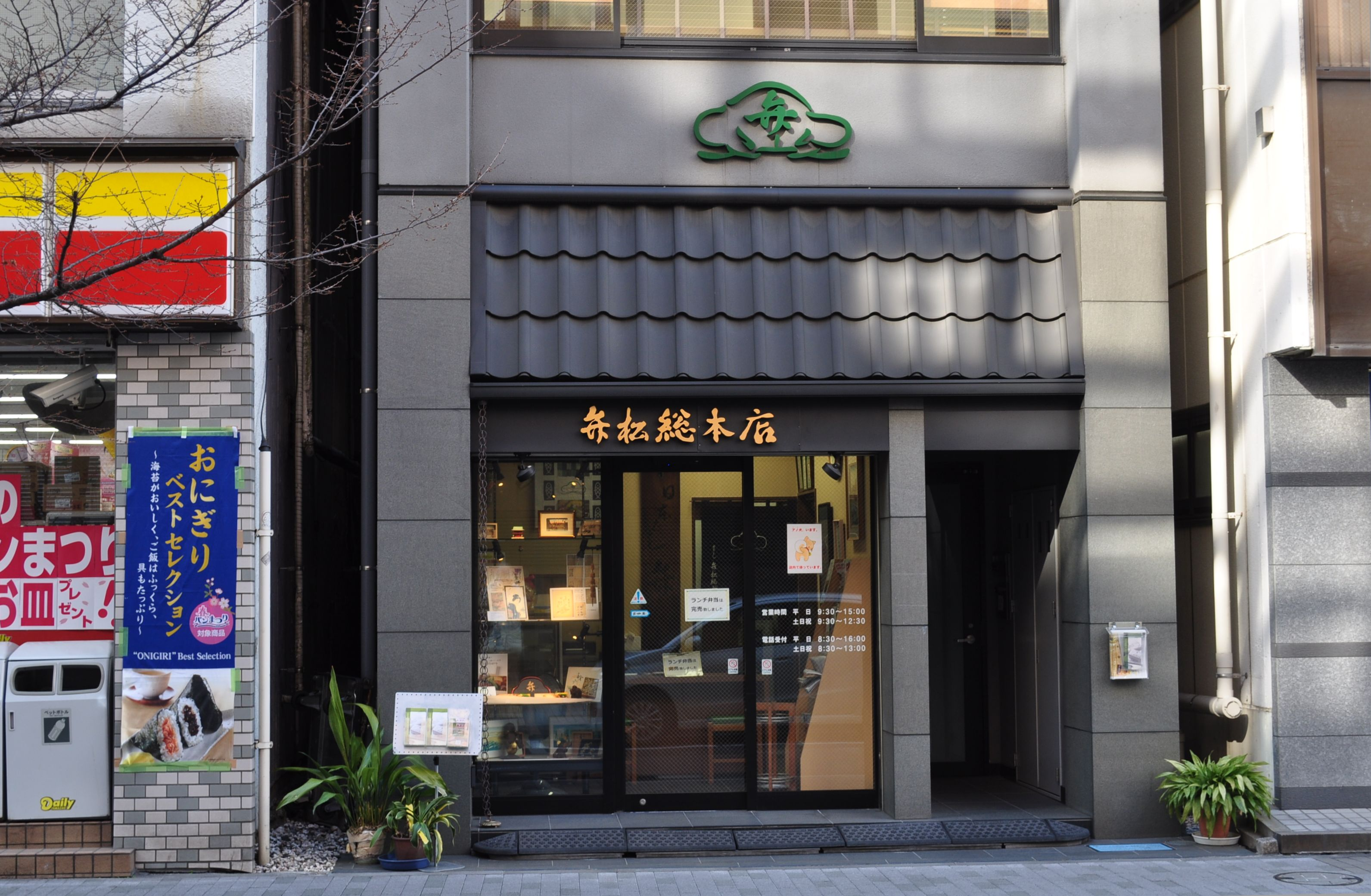 日本場所弁松総本店